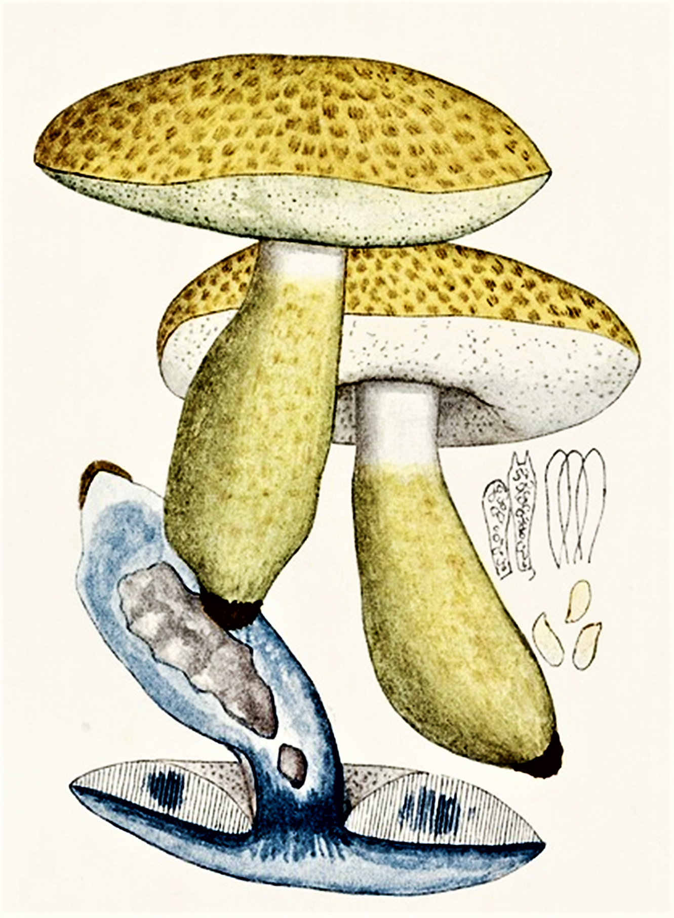 Giacomo Bresadola: Boletus cyanescens Bull. (1788), heute Gyroporus cyanescens (Bull.) Quél. (1886)